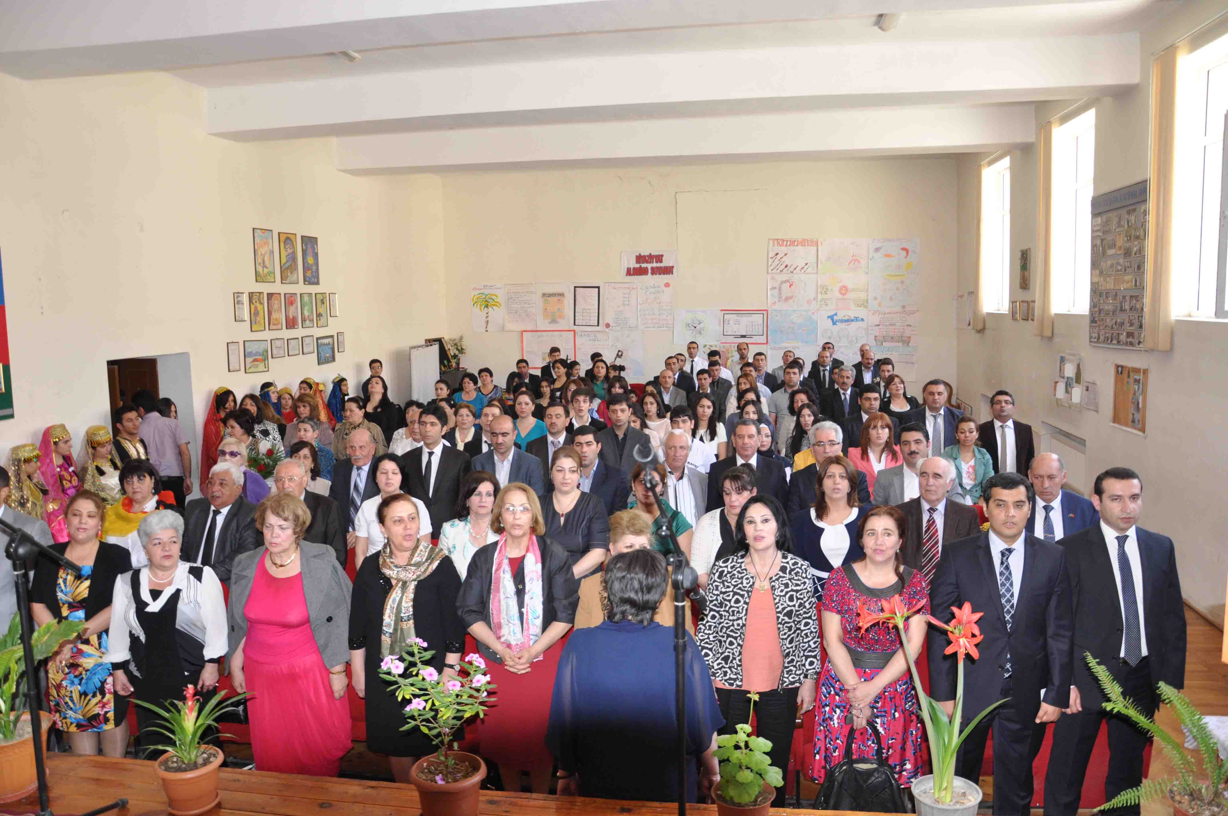 “İşıq-qadın” jurnalının 190 nömrəli məktəblə görüşü